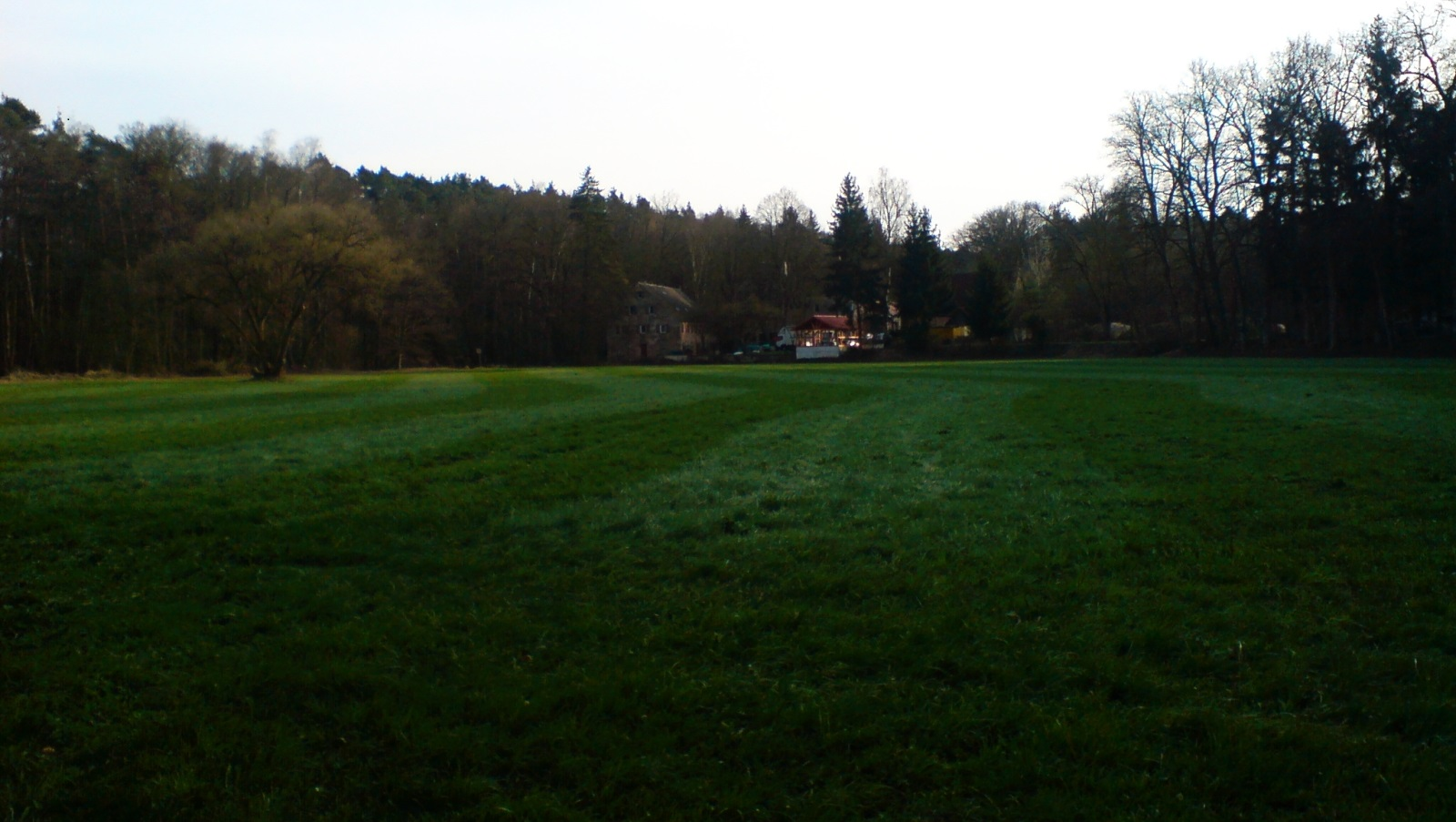 Königshammer von Osten fern